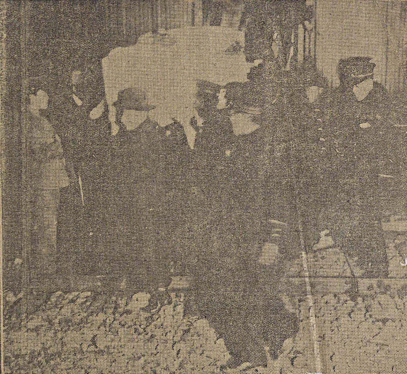 서울 남대문역에서 내린 민원식의 영구